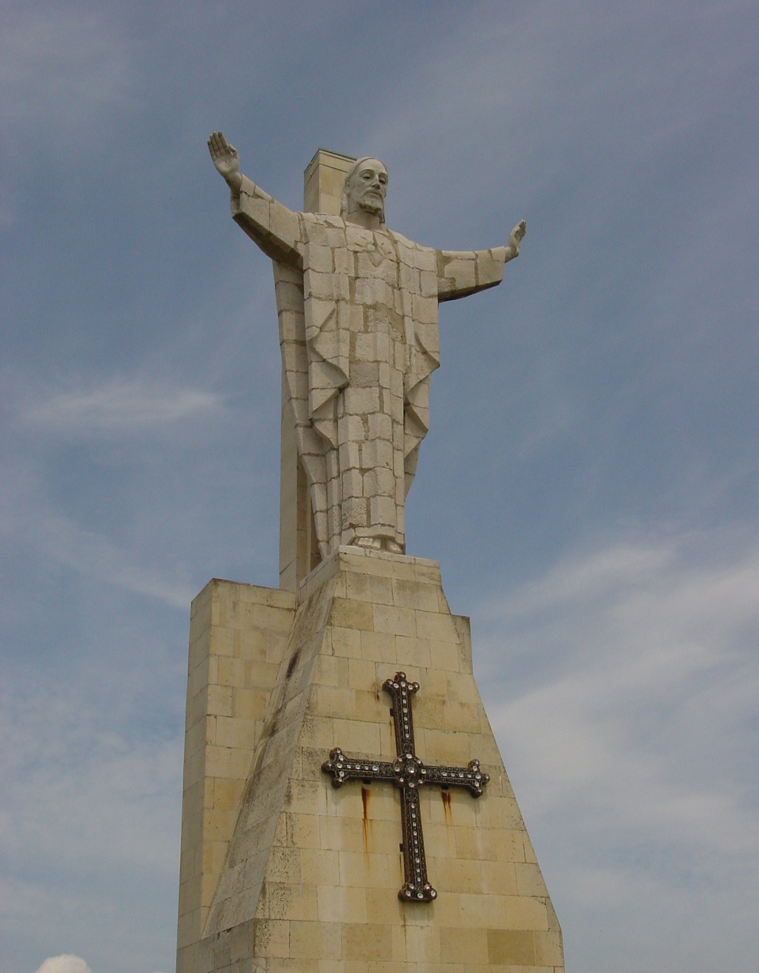 El llamado "Cristo del Naranco" es una estatua del Sagrado Corazón de Jesús que en forma de Jesucristo con los brazos abiertos, abraza a la ciudad de Oviedo - Asturias - España. Fue construída en los años 60 a voluntad popular.